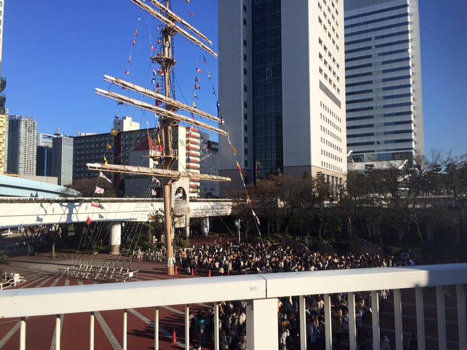 WaTの最後の握手会。 WaT's handshake event.